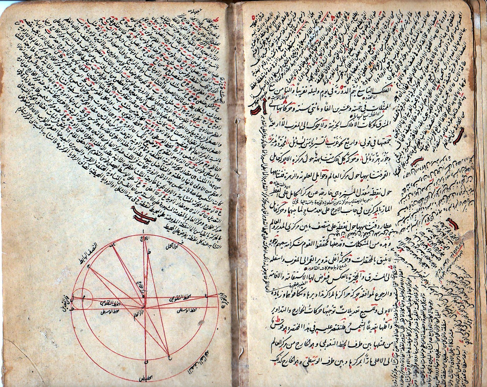 صفحة من كتاب (تشريح الأفلاك) في علم الهيئة، من تأليف بهاء الدين العاملي وعلى غلاف الكتاب ختم واهداء الشيخ نعمان خير الدين الآلوسي إلى استاذهِ وشيخه ملا قاسم أفندي المفتي عام 1273هجري/ 1856م، في بغداد